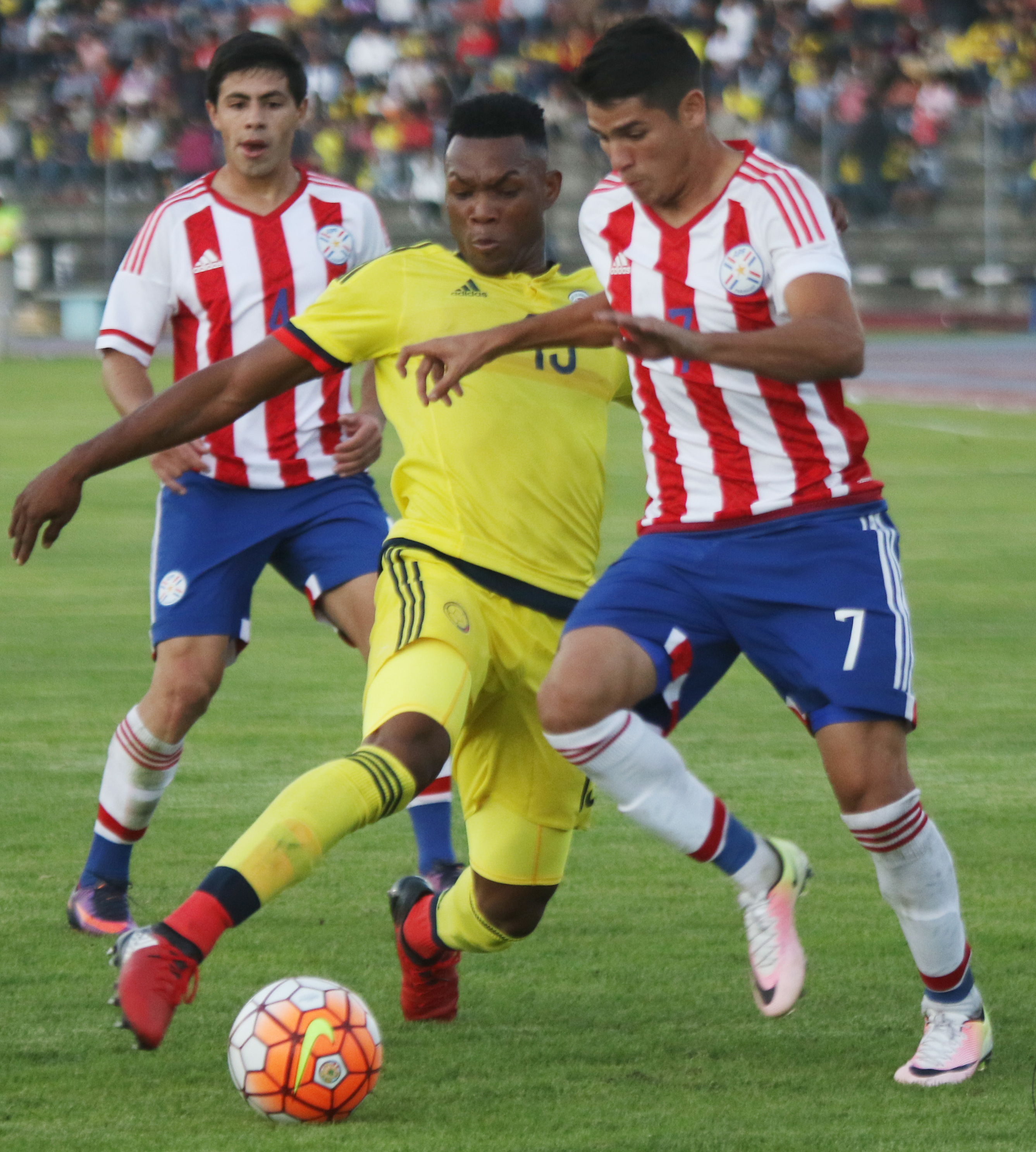 Riobamba, Ecuador, 18 enero 2017 (Andes).- Las selecciones nacionales de Paraguay y Colombia igualaron 1-1 este miércoles en el estadio Olímpico de Riobamba (centro andino) en el inicio del Campeonato Sudamericano Sub 20 Ecuador 2017. ANDES/Micaela Ayala V.